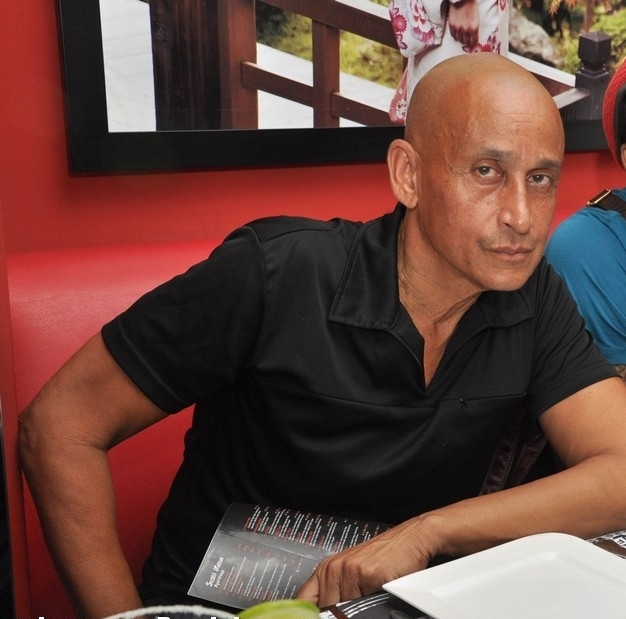 El actor y productor dominicano Juan Fernández.